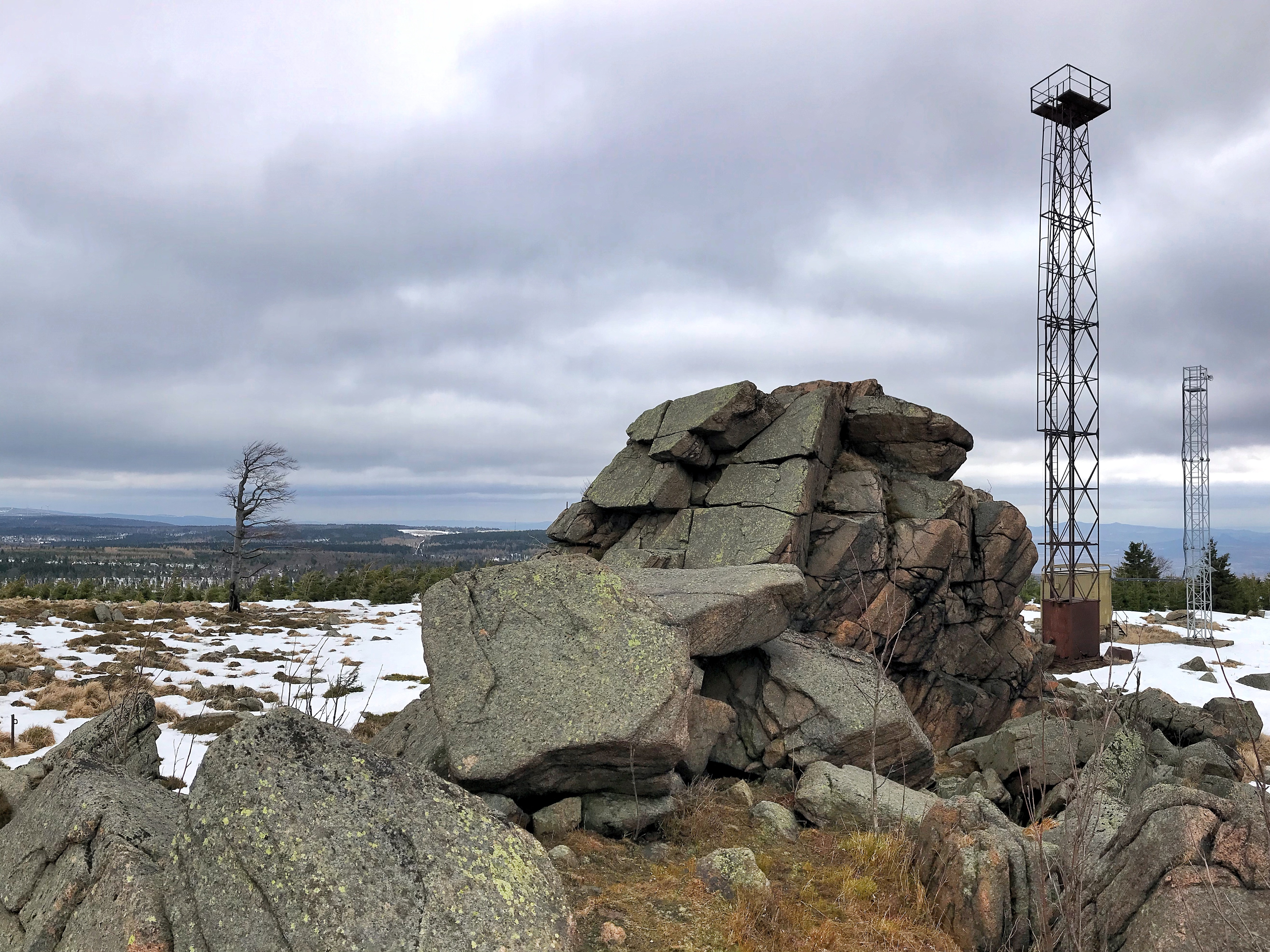 Vrchol hory Loučná (956 m) v Krušných horách